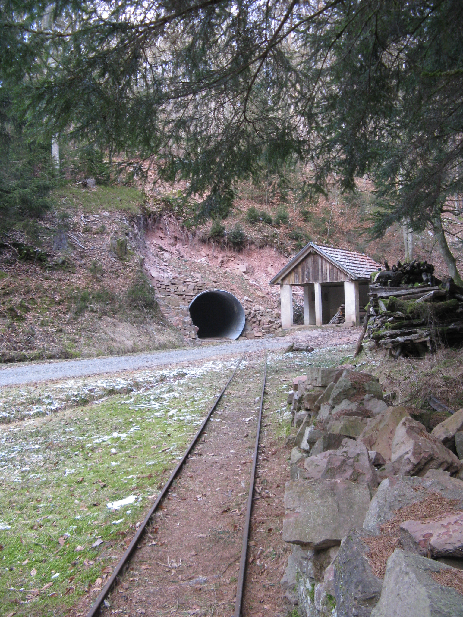 Erichstollen (Partenstein/Spessart), ehemaliger Schwerspatabbau